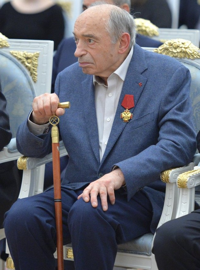 Церемония вручения государственных наград Российской Федерации